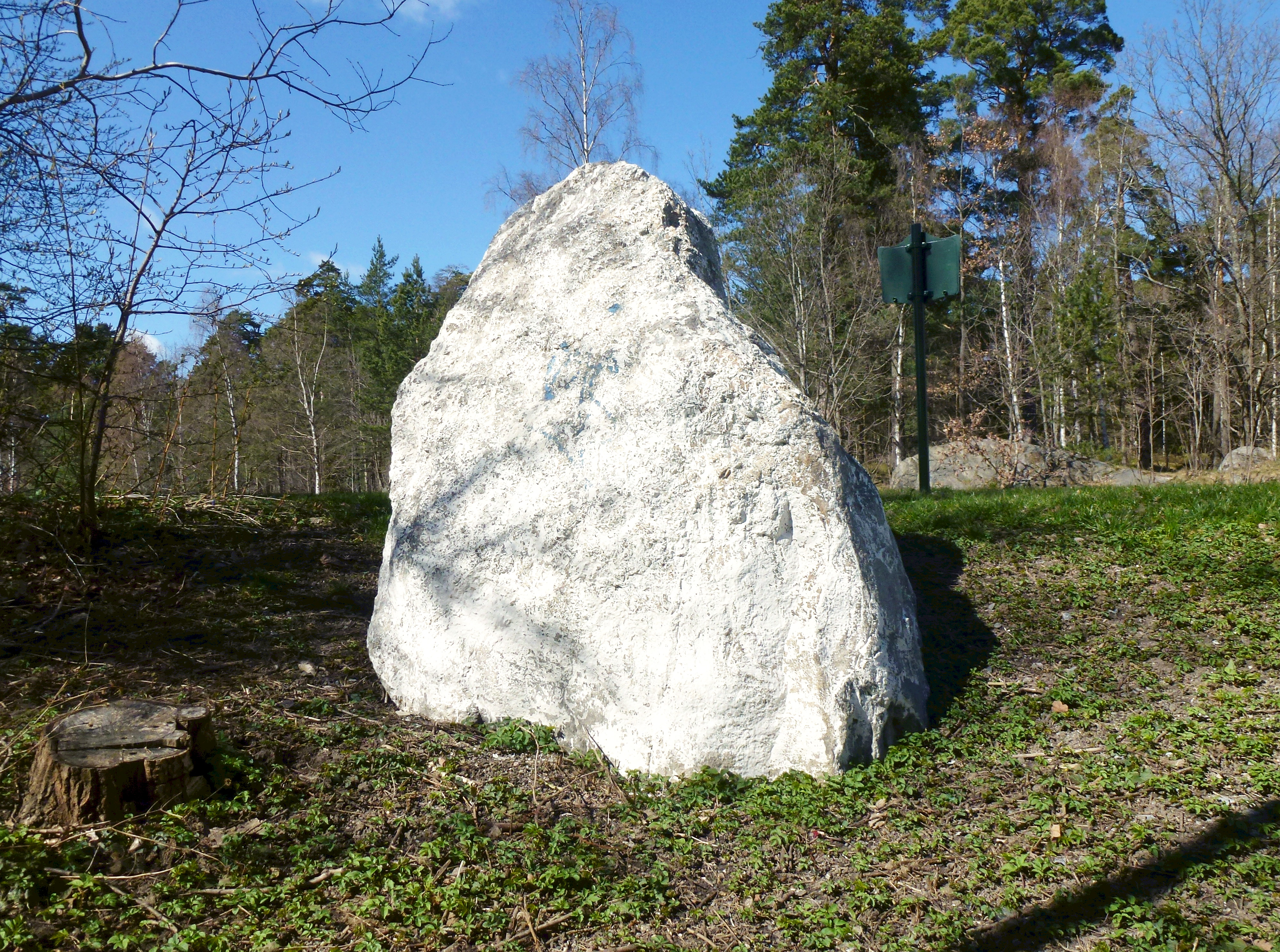 Gränsstenen "Vita stenen", som angav en gränsmarkering där de två gårdarna Enskede gård och Hammarby gård mötte Skarpnäcks gårds ägor.